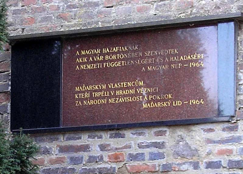 Magyar és cseh nyelvű emléktábla a Spilberg vár falán